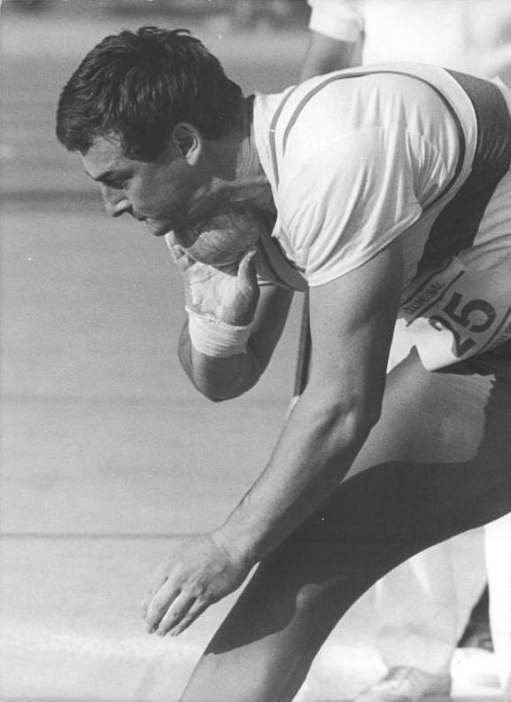 Ulf Timmermann ADN-ZB Thieme 17.8.86 Dresden: Leichtathletik-"Goldenes Oval"- Der Berliner Kugelstoßer Ulf Timmermann zeigte sich in ausgezeichneter Verfassung. Seinen eigenen Weltrekord vom Vorjahr verfehlte er lediglich um 15 cm. Er beförderte die Kugel auf 22,47 m.